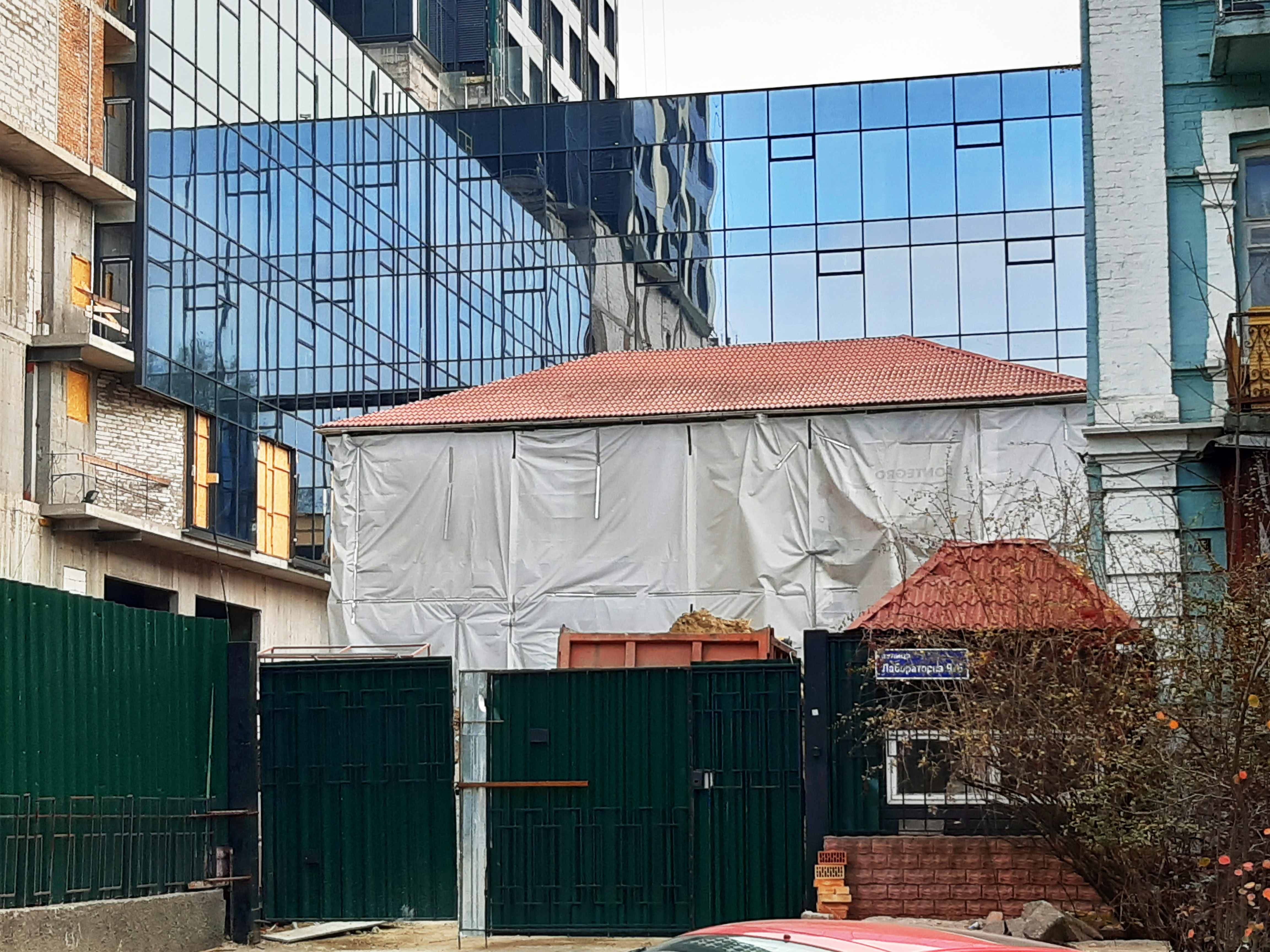 Руйнування особняка, Київ, Лабораторна вул., 9б